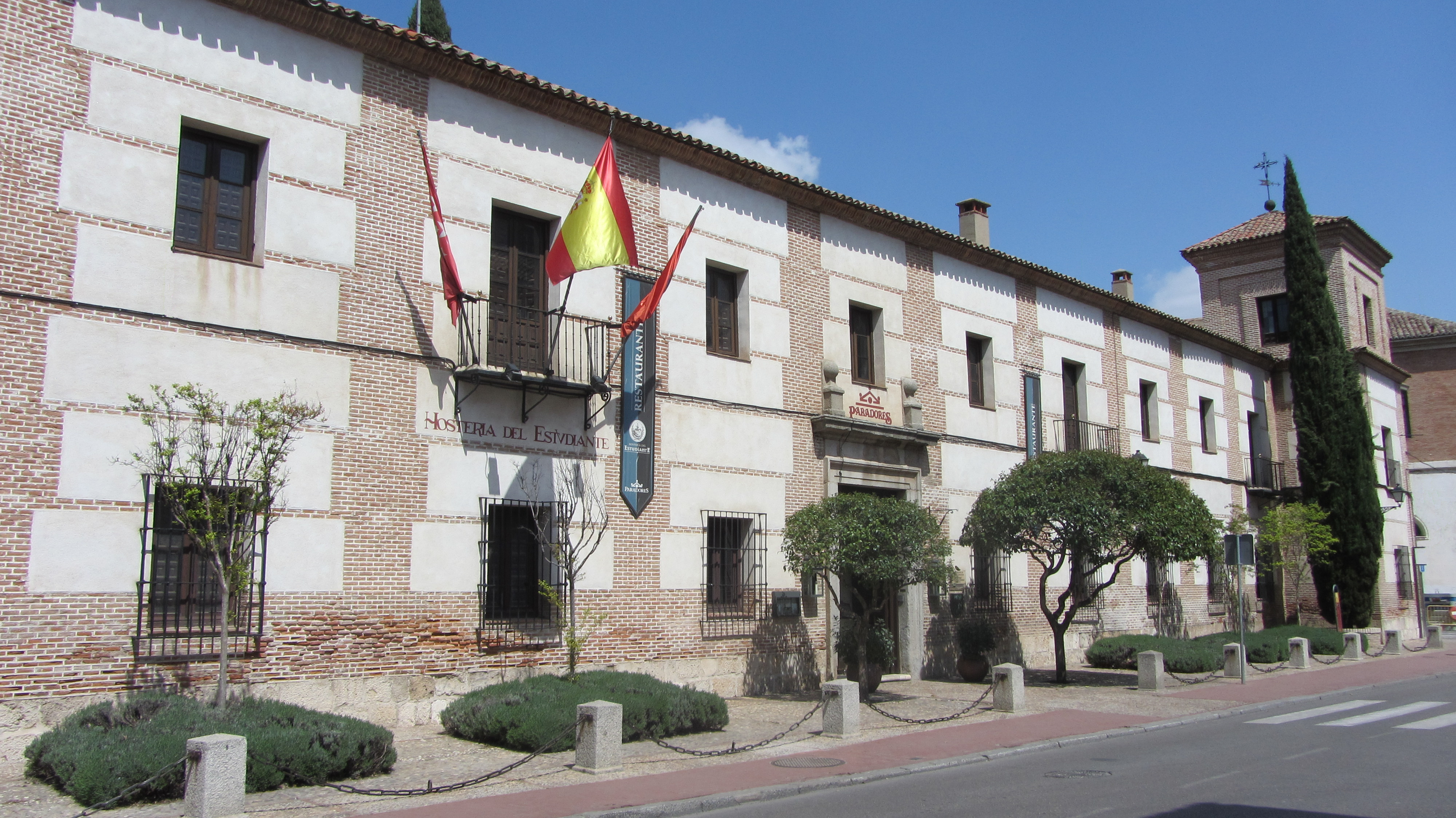 Fachada del Colegio menor de San Jerónimo o Trilingüe de la Universidad de Alcalá. Fundado en 1528 y clausurado en 1779, para unirse a otros colegios y constituir el Colegio menor de la Inmaculada Concepción de Nuestra Señora. Actualmente es la sede de la Hostería del Estudiante de Alcalá de Henares (Comunidad de Madrid - España).